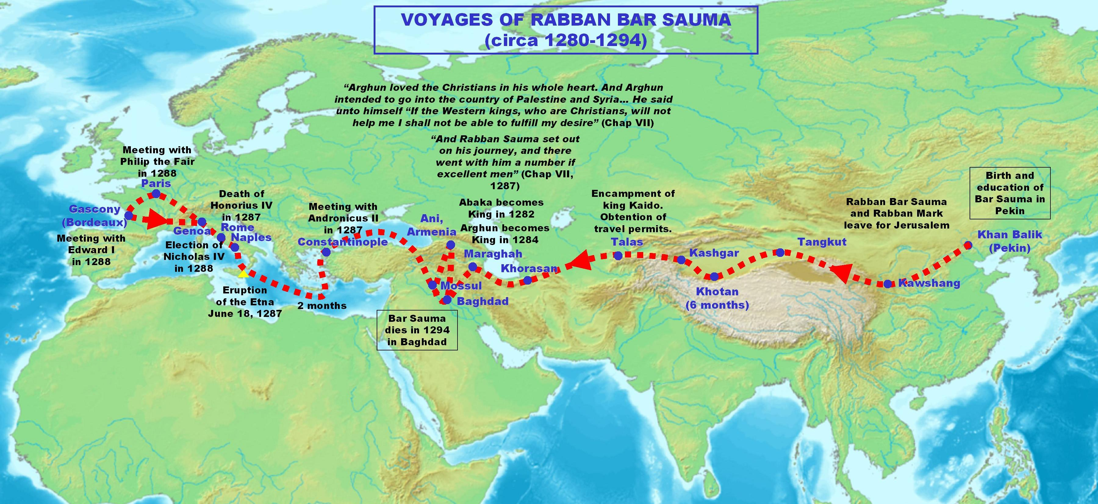 Voyages Of Rabban Bar Sauma